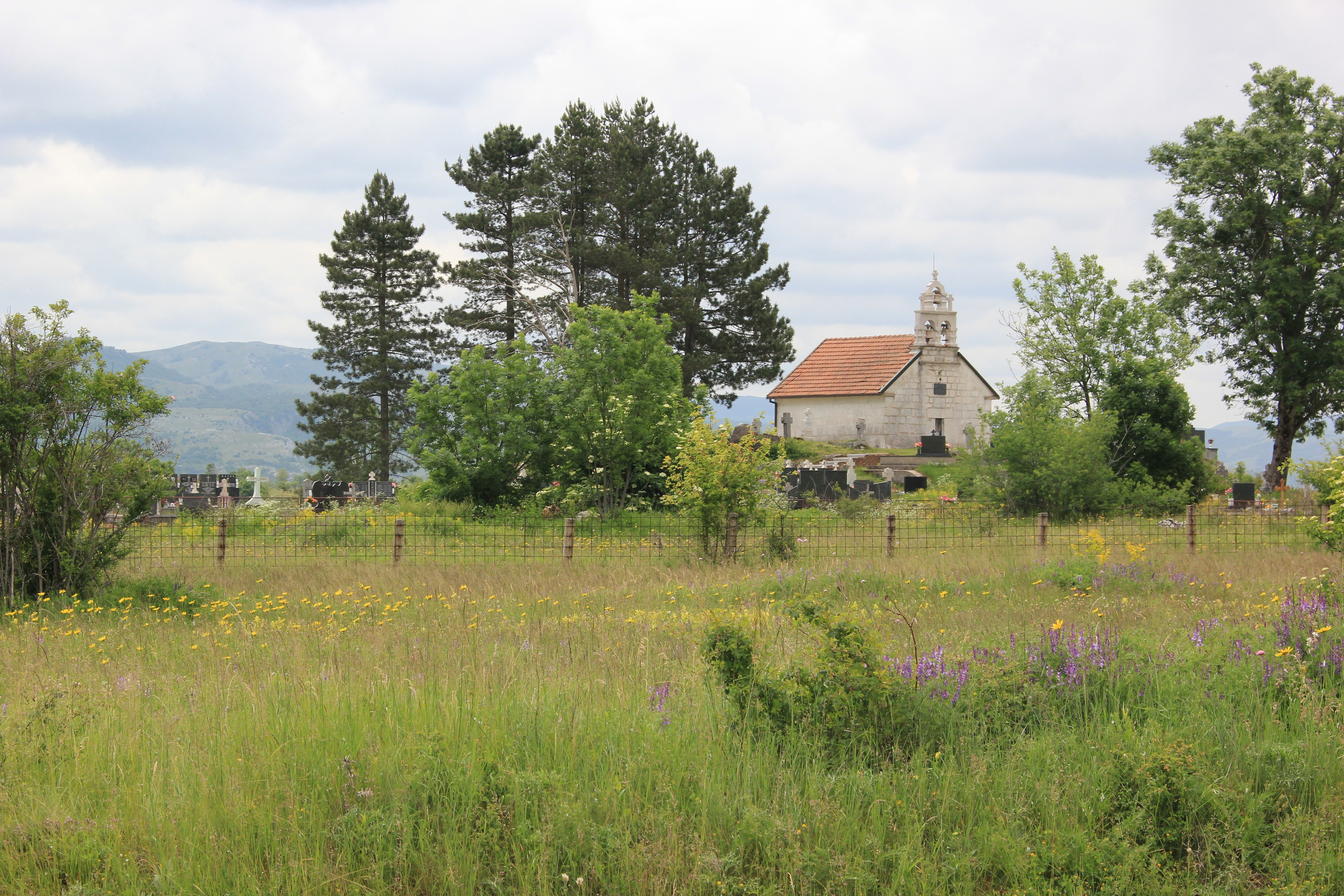 Kirche der Hlg. Dreifaltigkeit in Kifino Selo, Gemeinde Nevesinje